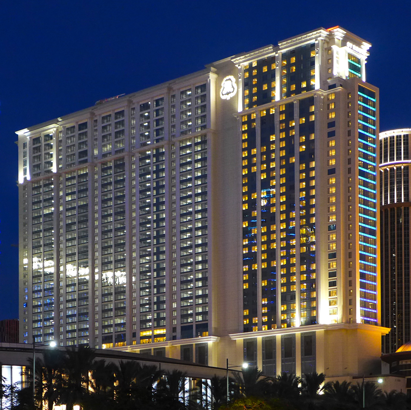 St Regis Macao Night view